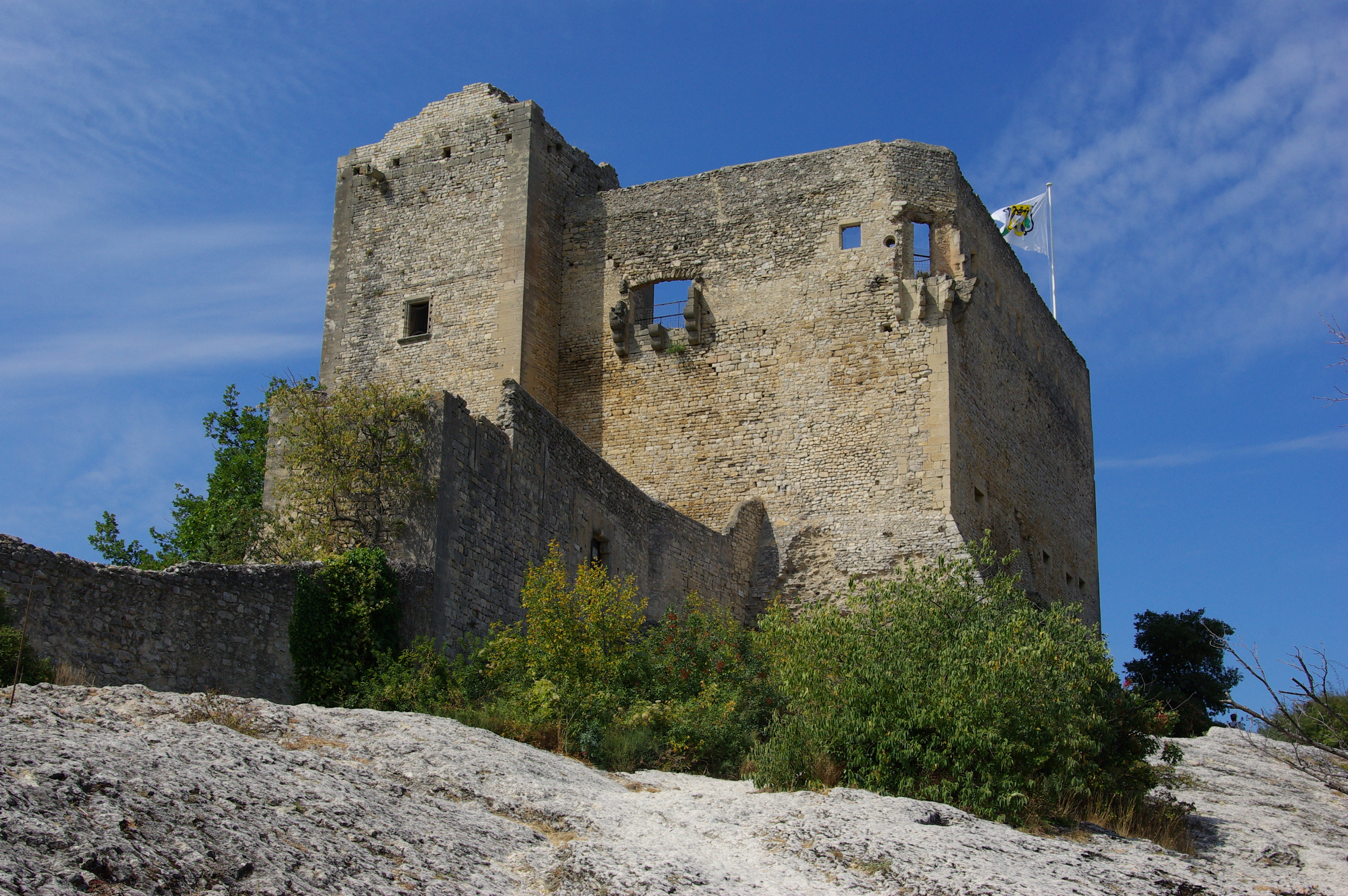 Château des Comtes de Toulouse à Vaison la romaine